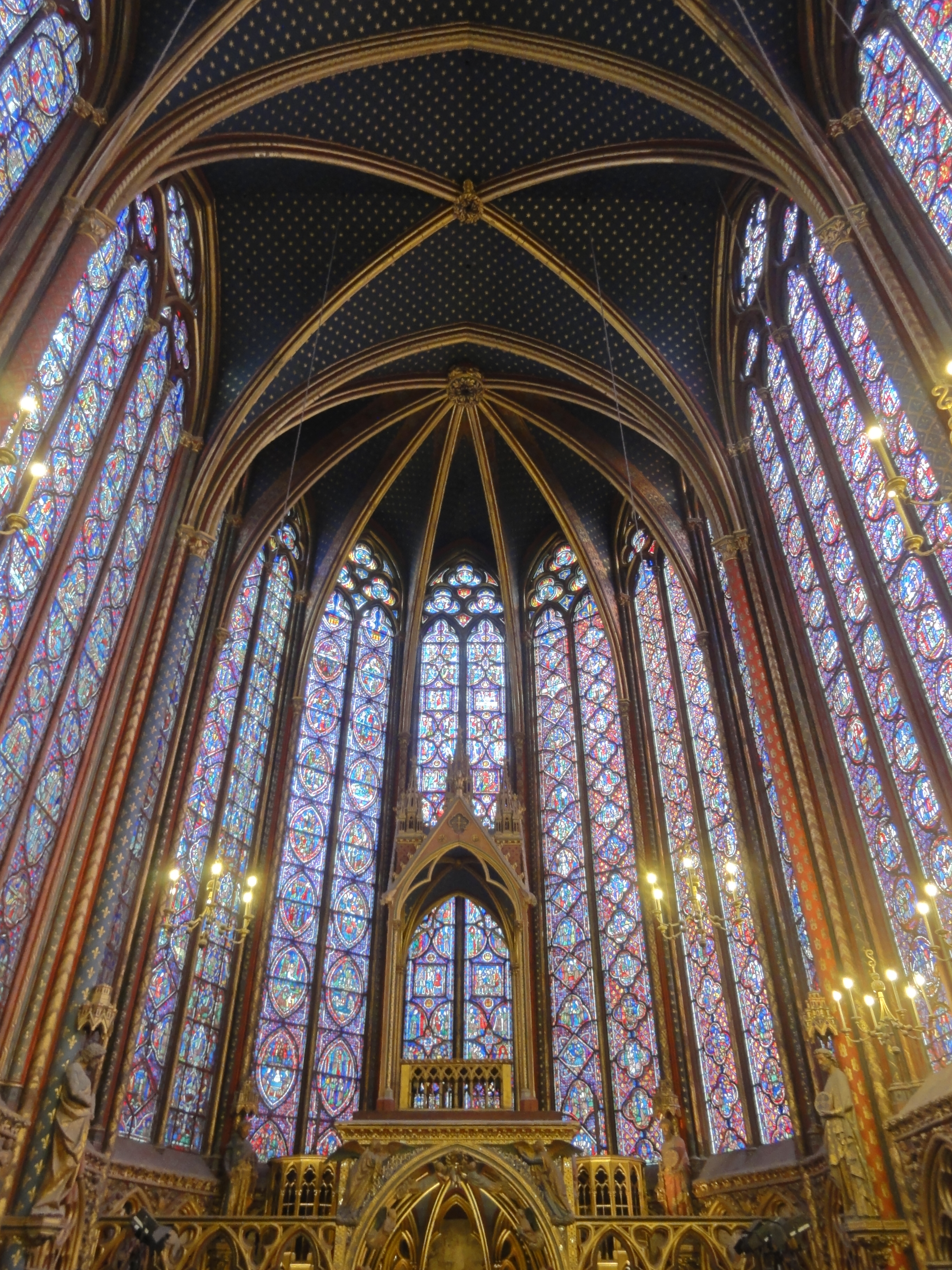 Chapelle haute, vue vers l'est.